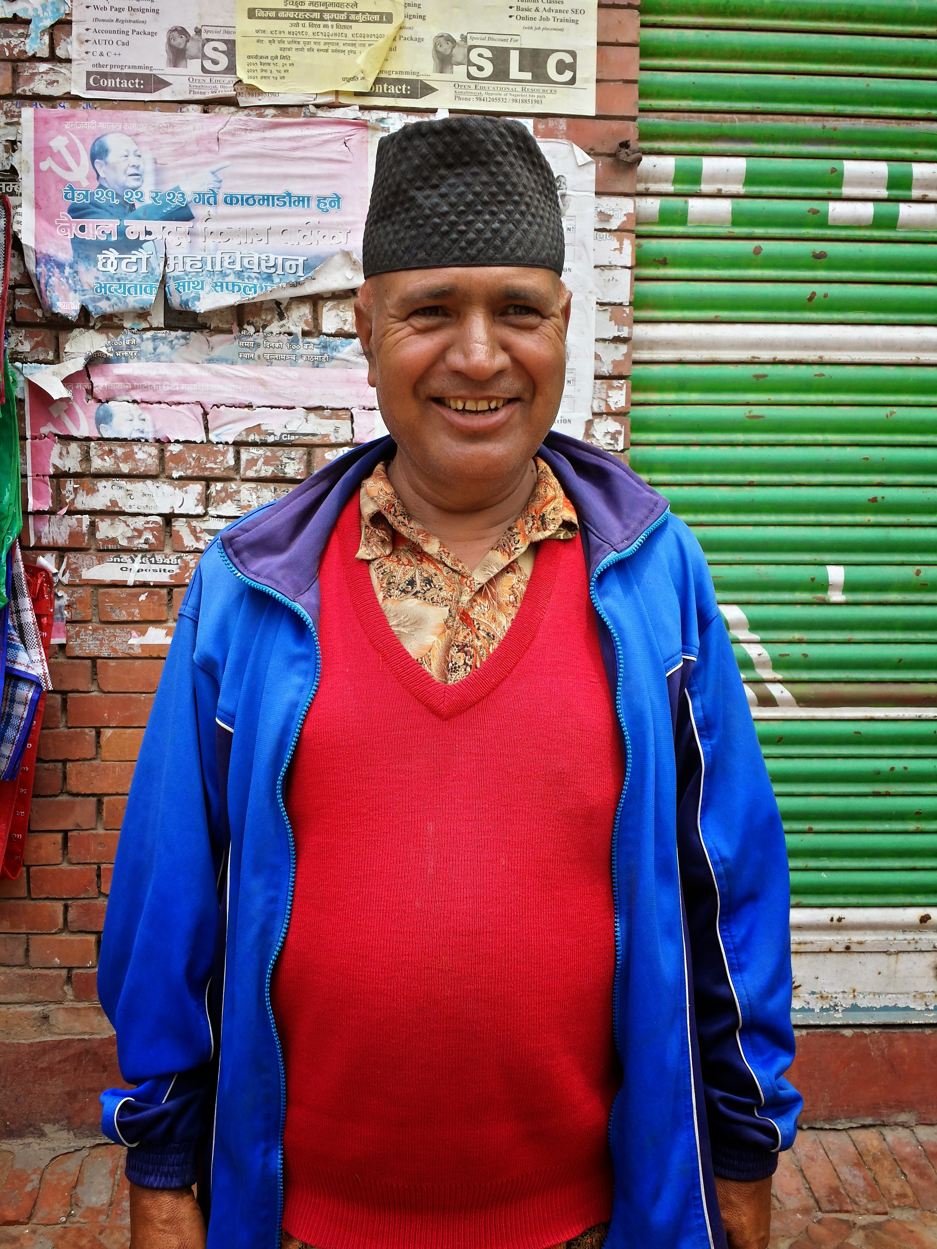 नेपाली: Nepali Singer Buddhi Krishna Lamichhane in Kamalvinayak -4 Bhaktapur near Nagarkot Bus Stop